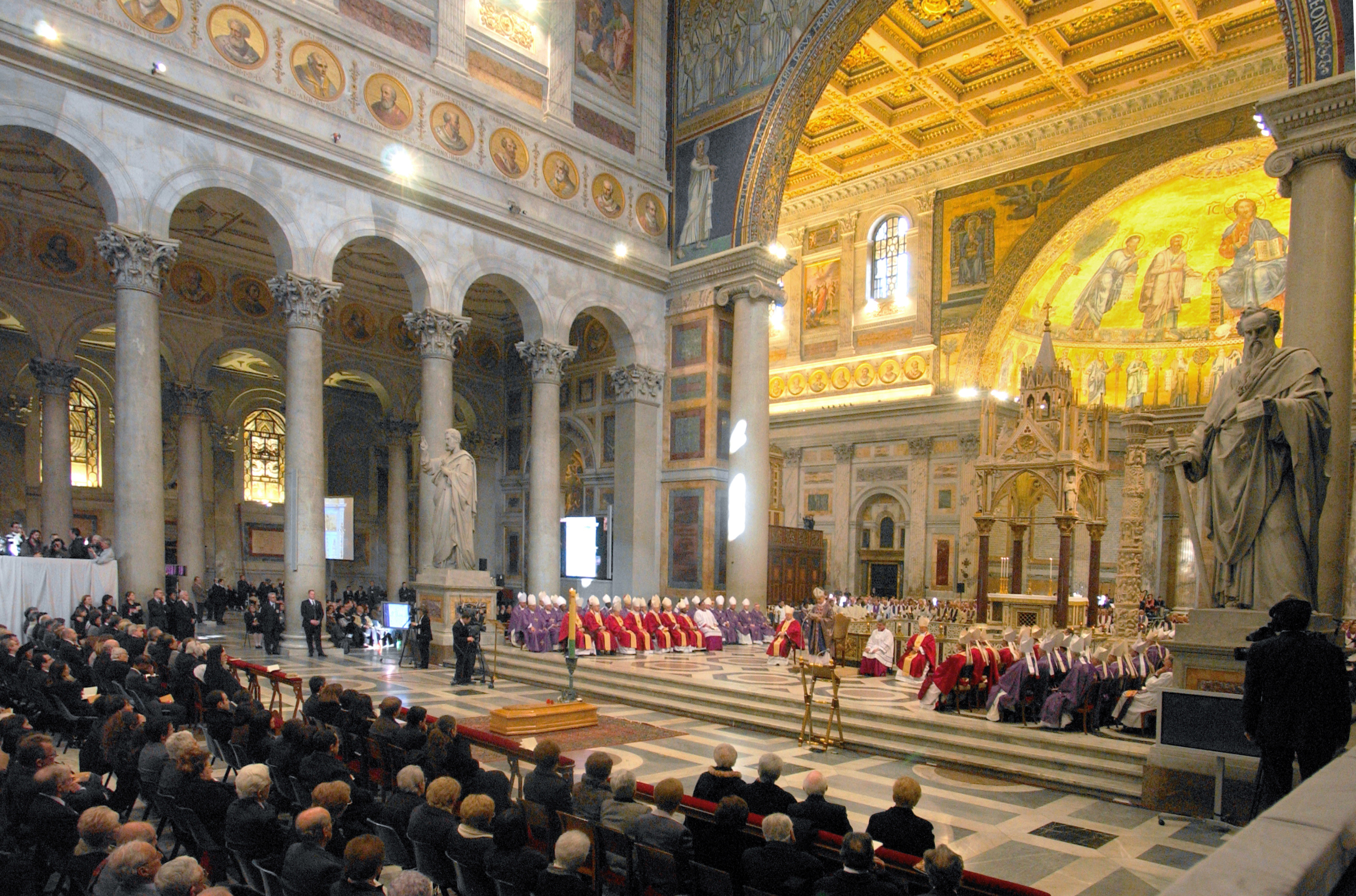 Funerali Chiara Lubich